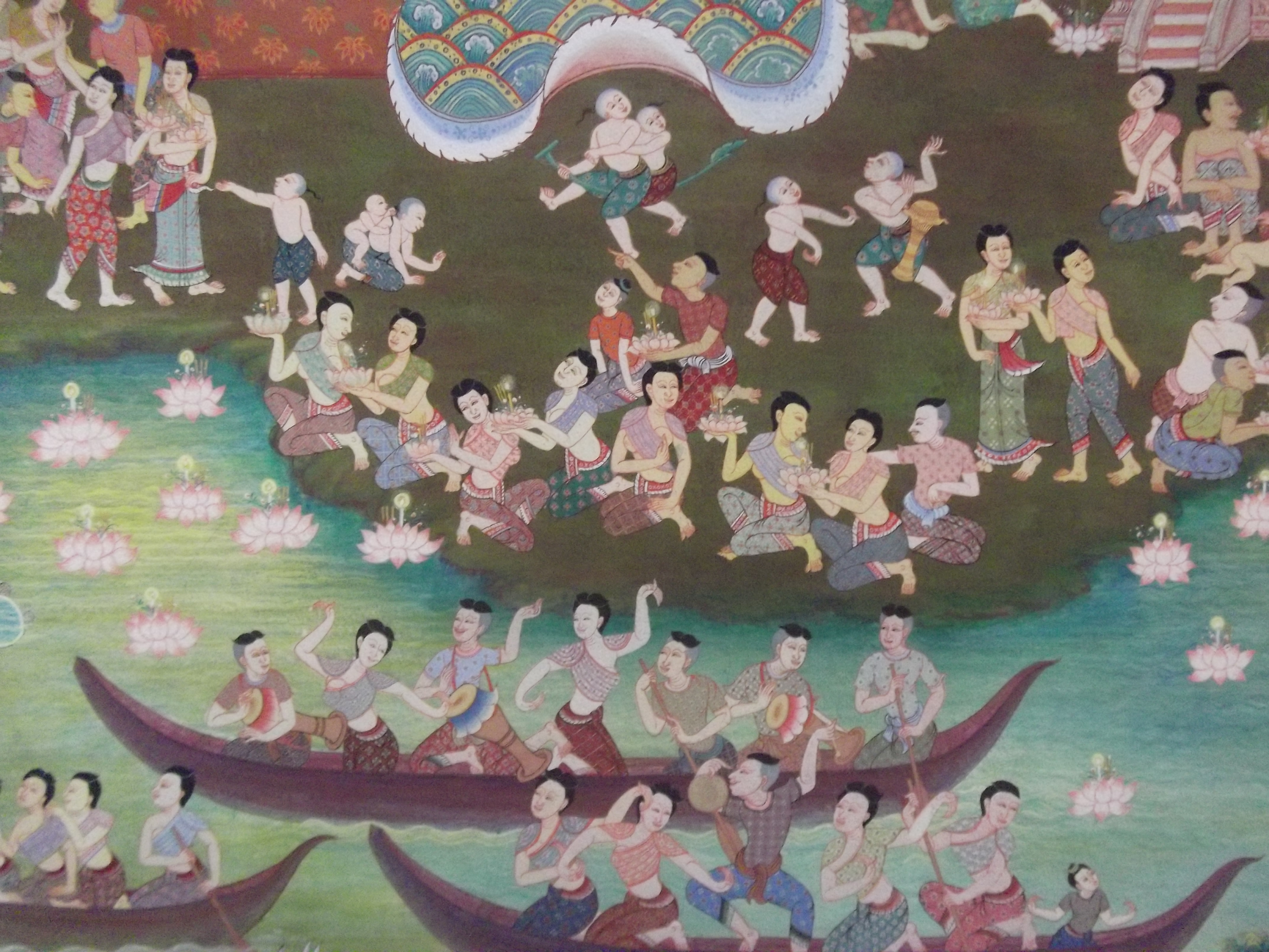 วัดแก้วไพฑูรย์